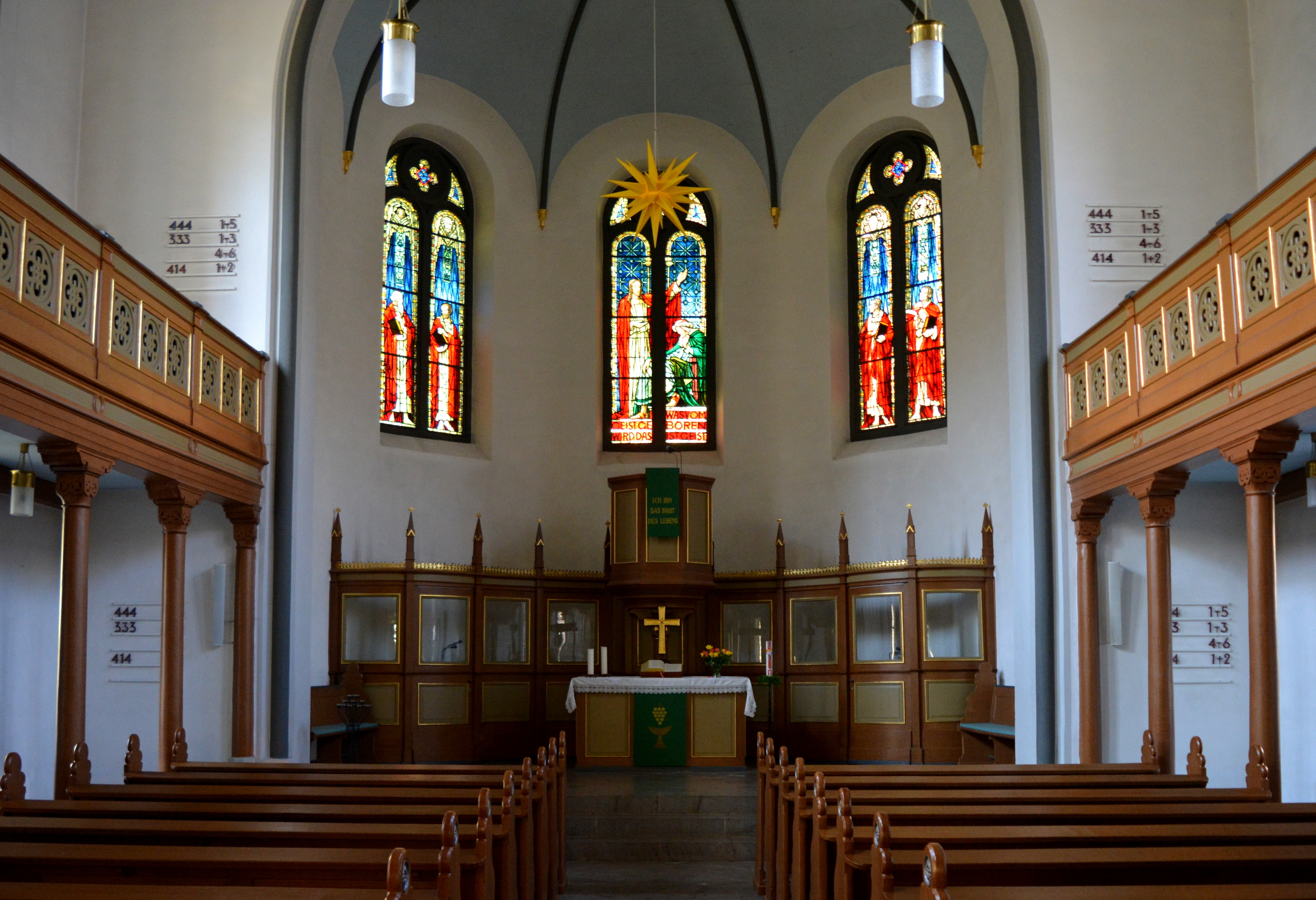 Evangelische Kirche, Sankt Goarshausen